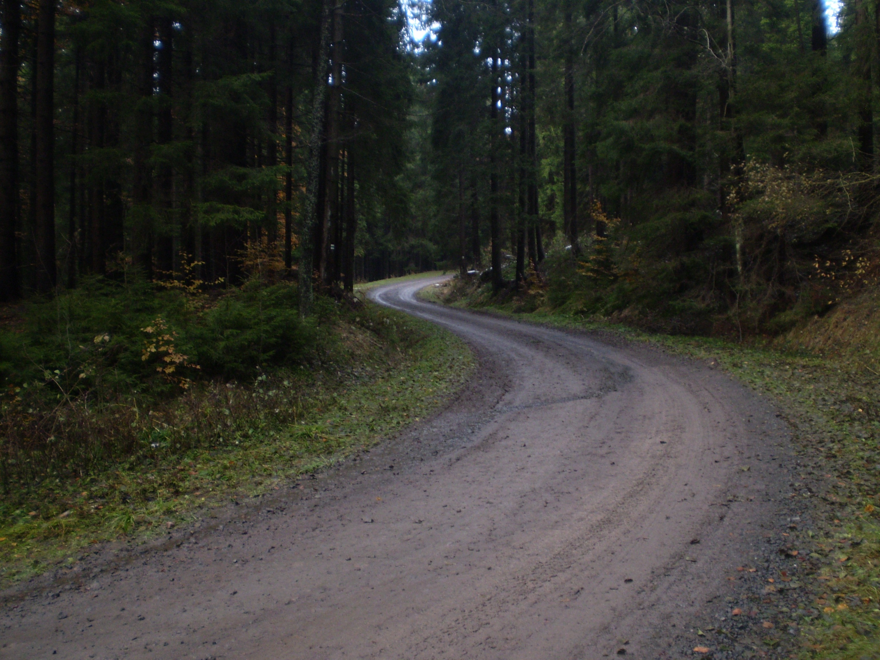 Uhelný důl v Orlických horách - pevnostní silnice Těchonín - Bouda